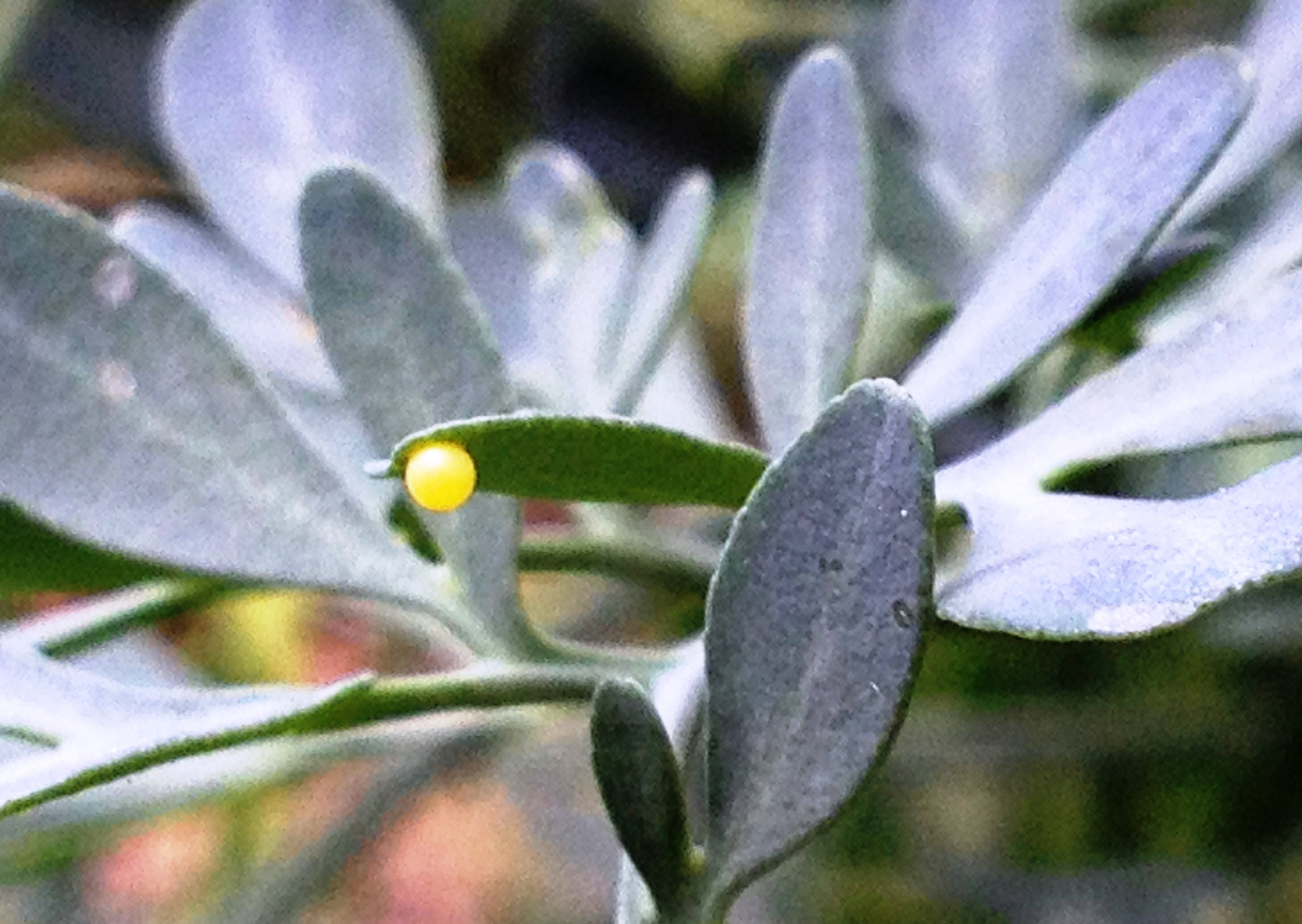 ביצת זנב סנונית נאה בת יום על צמח פיגם